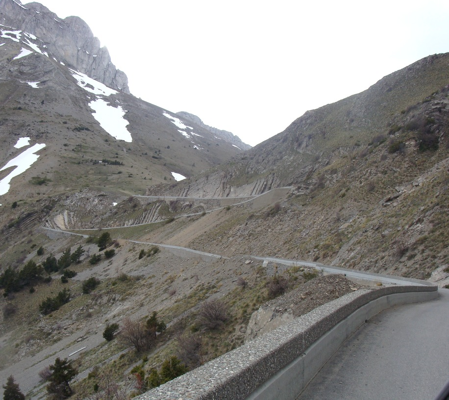 La route d'accès au col du Noyer côté Champsaur (Département Hautes-Alpes)